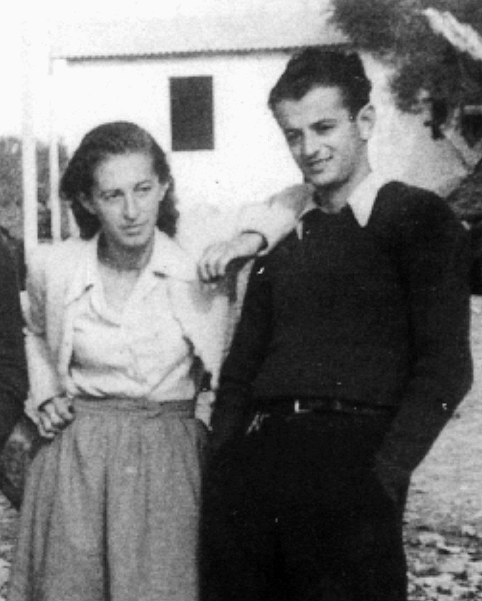 הרטה ורומק רייך במחנה עקורים בארי באיטליה נובמבר 1943